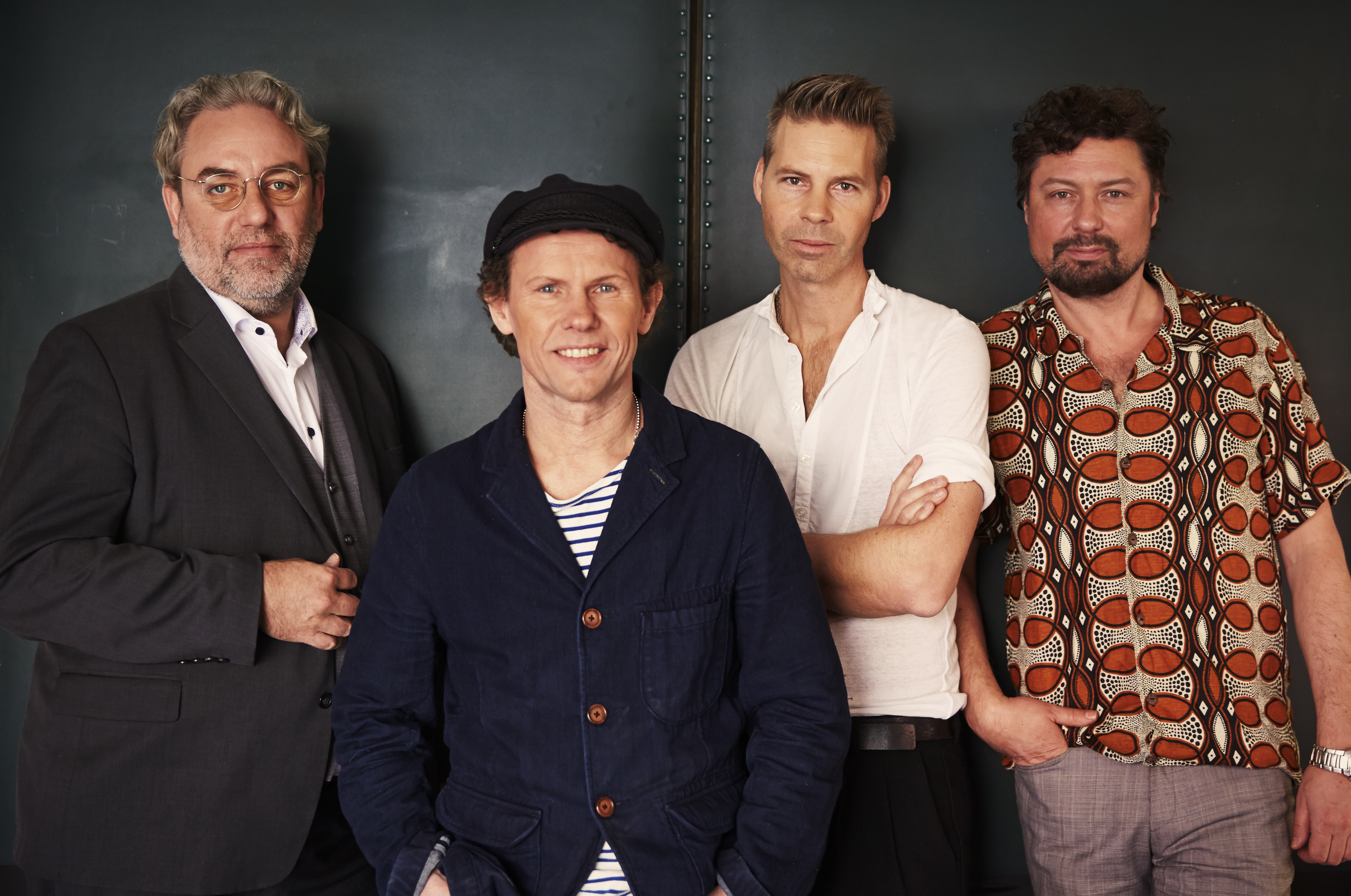 Pressbild på Bo Kaspers orkester. Foto: Jörgen Hildebrandt